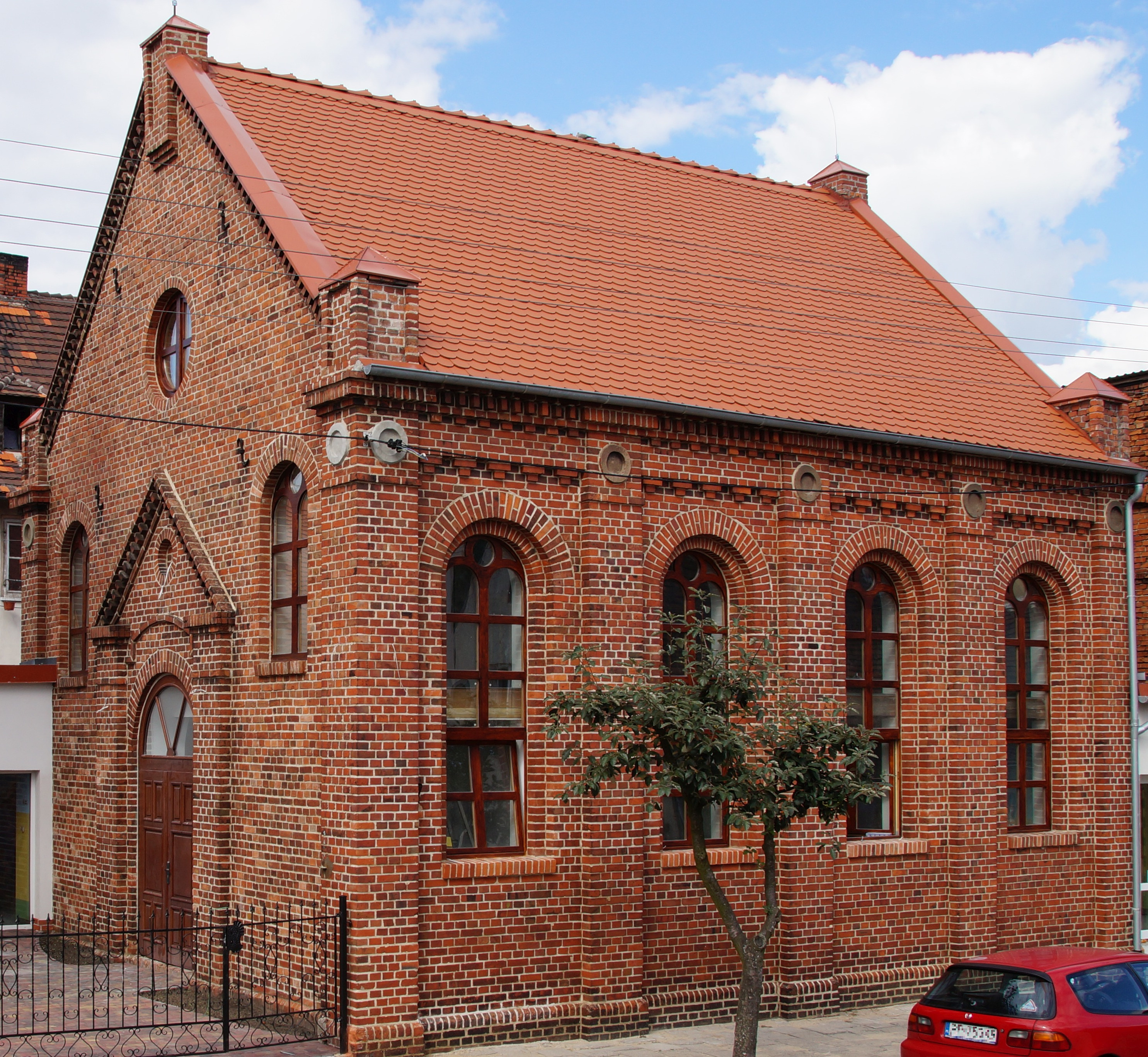 Zdjęcie z 2014r